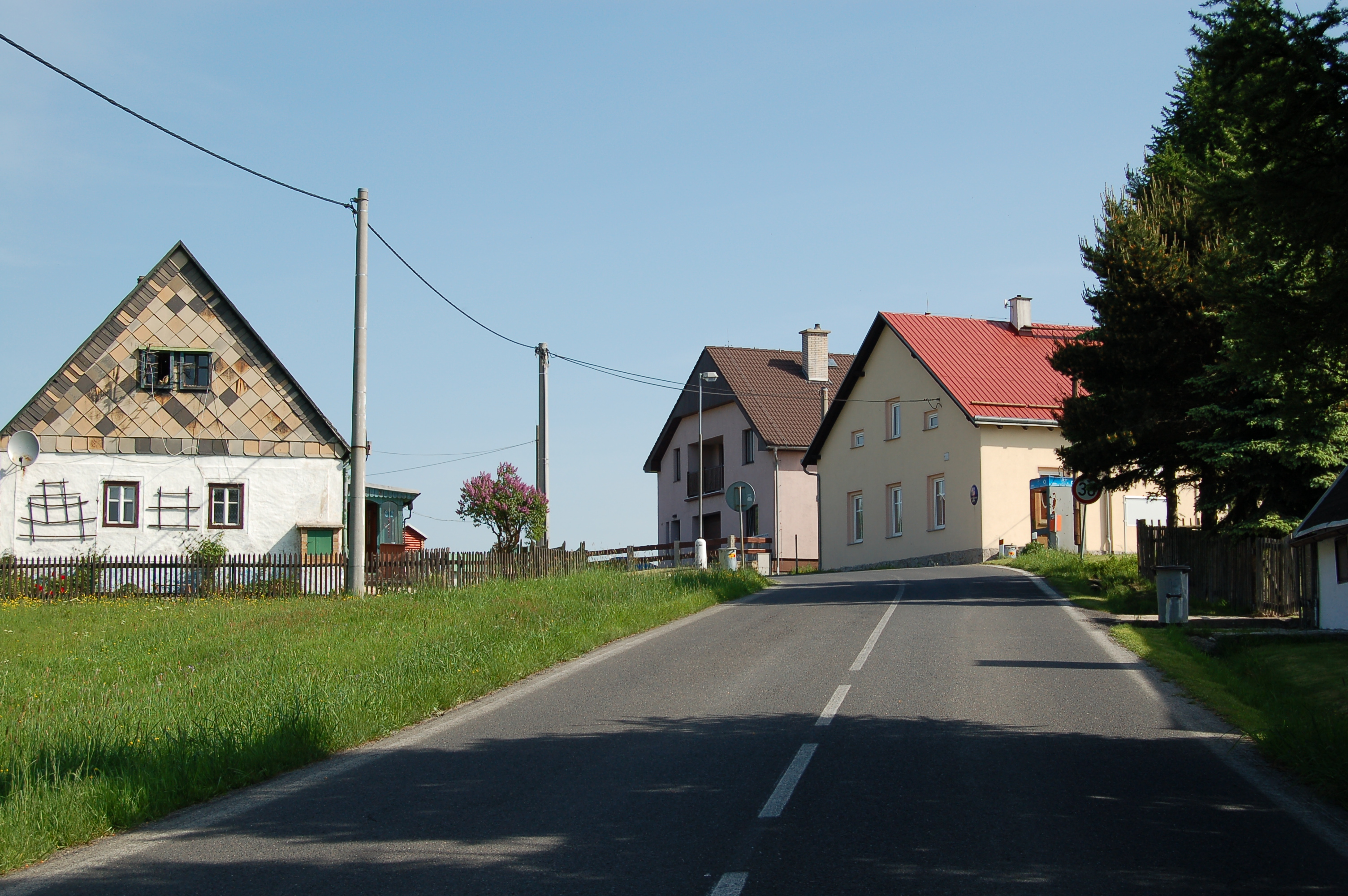 Obec Klíny.